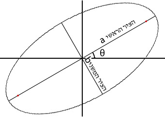 אליפסה מסובבת